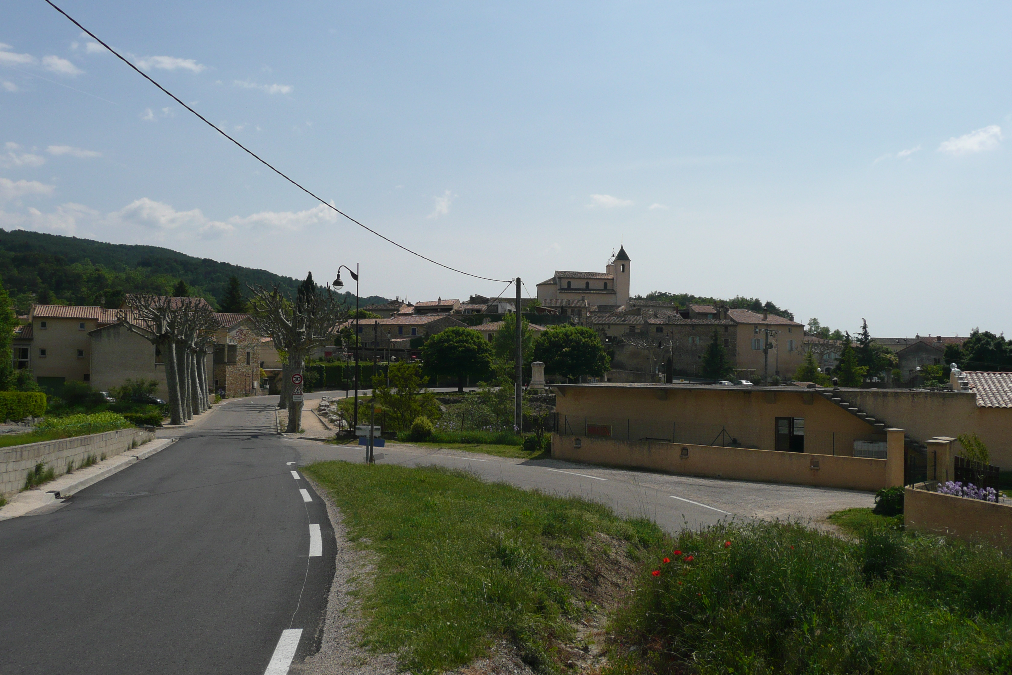 Vue d'ensemble sur Saint-Romain-en-Viennois.